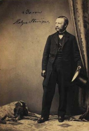 Holger Frederik Christian Stampe-Charisius (1822-1904), Danish Baron